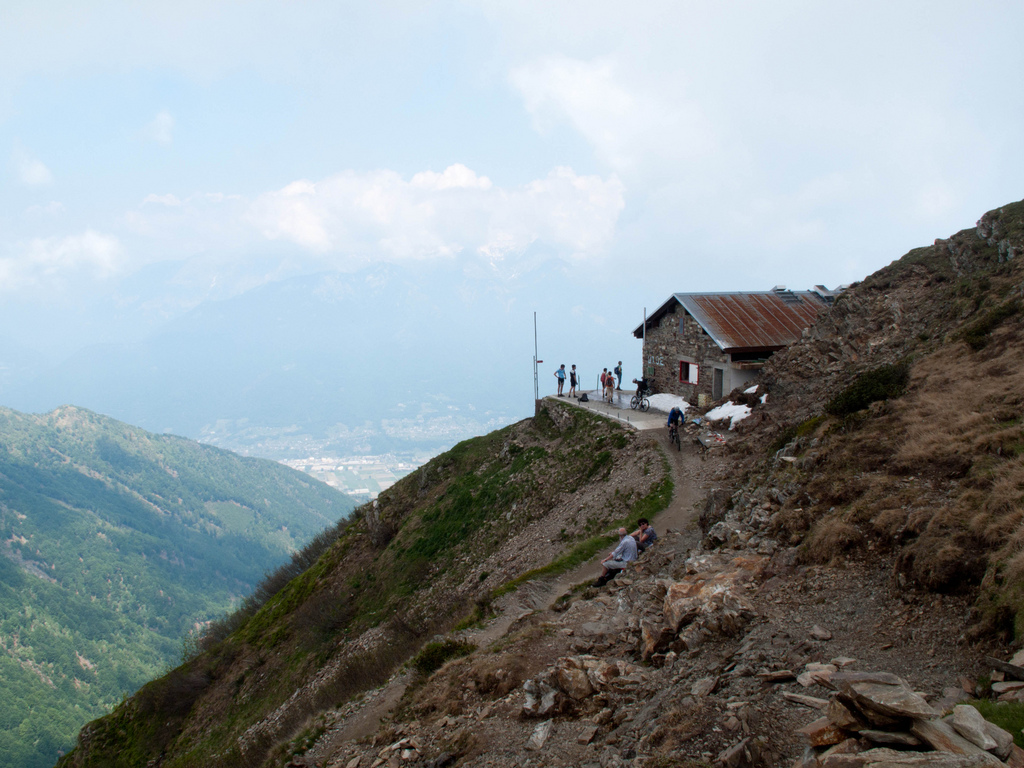 Capanna Tamaro (1867m) - UTOE Bellinzona